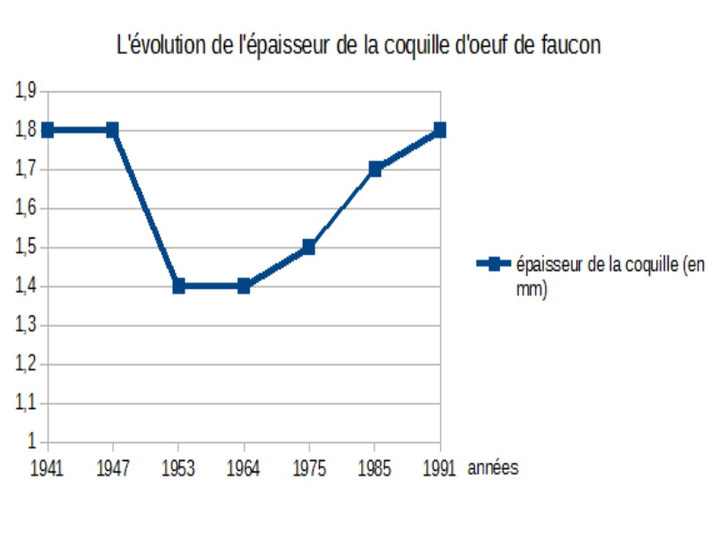 Ceci est graphique montrant l'évolution de l'épaisseur de la coquille de faucon pélerin